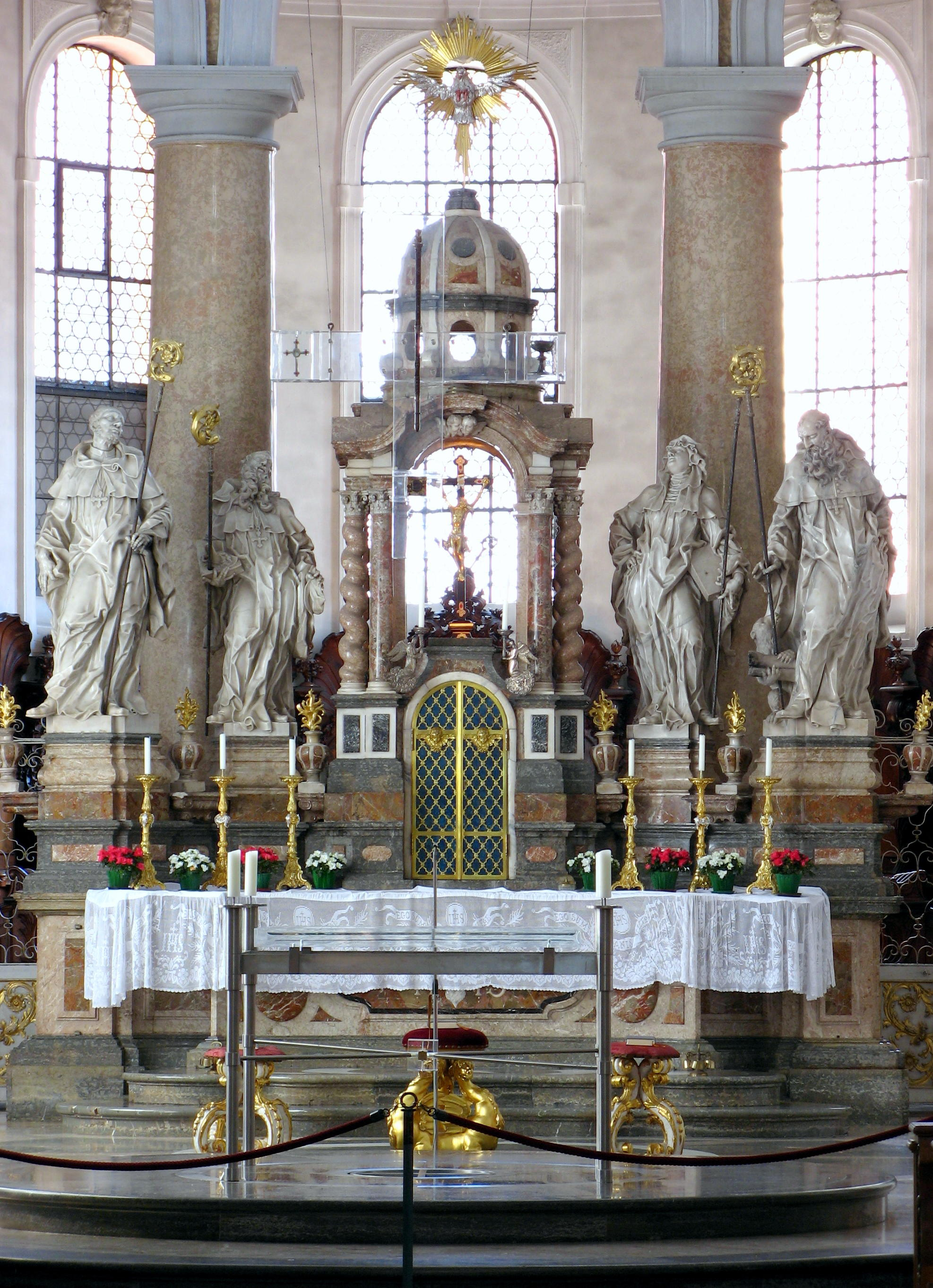 Johann Georg Fischer, Choraltar in der Klosterkirche St. Mang in Füssen